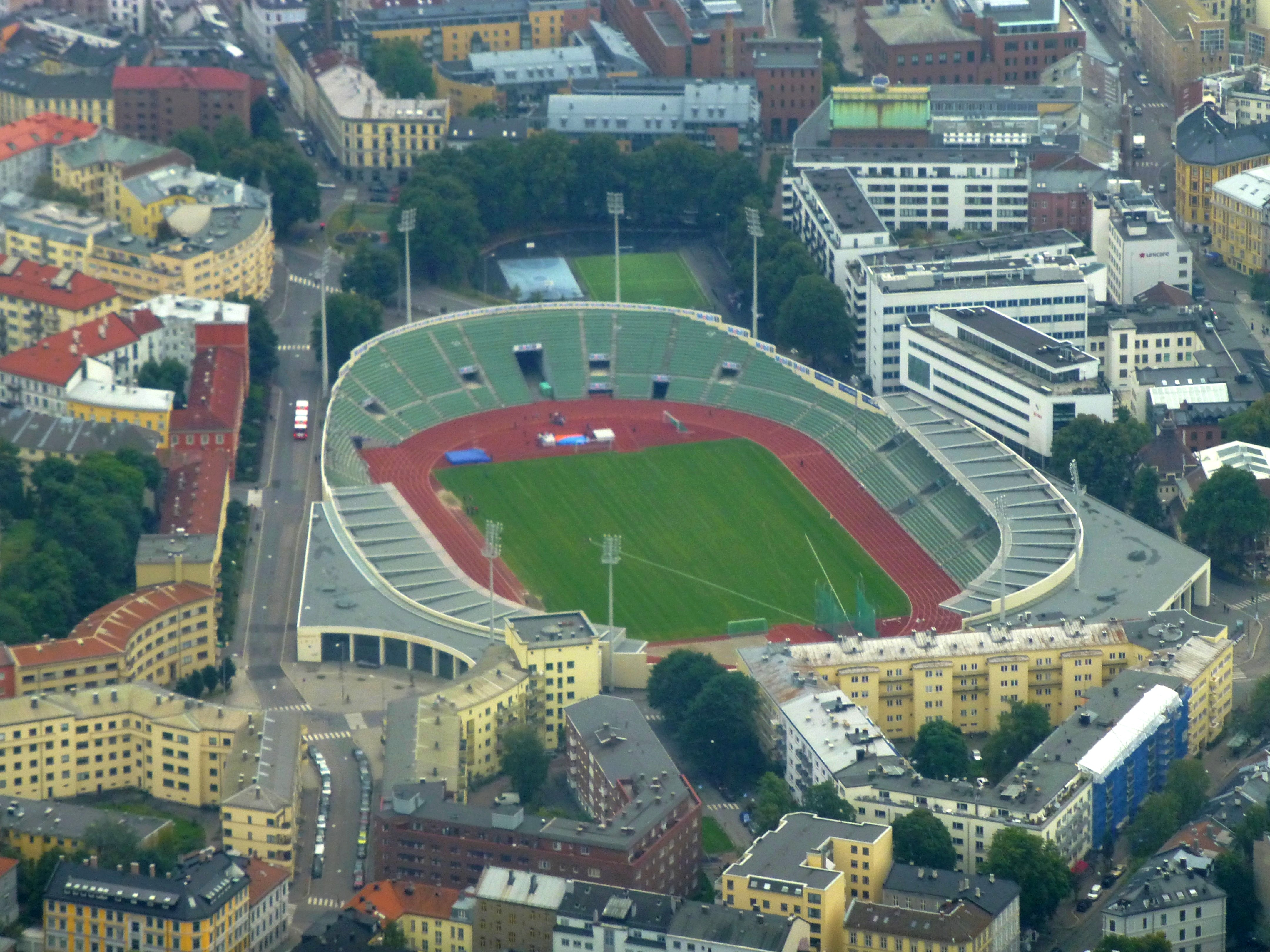 Oslo - Bislett Stadion aus der Luft